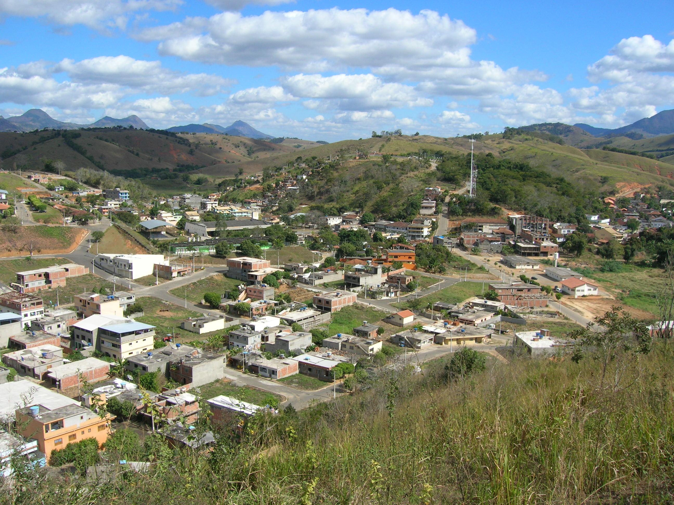 Vista de parte da cidade de São José de Ubá.